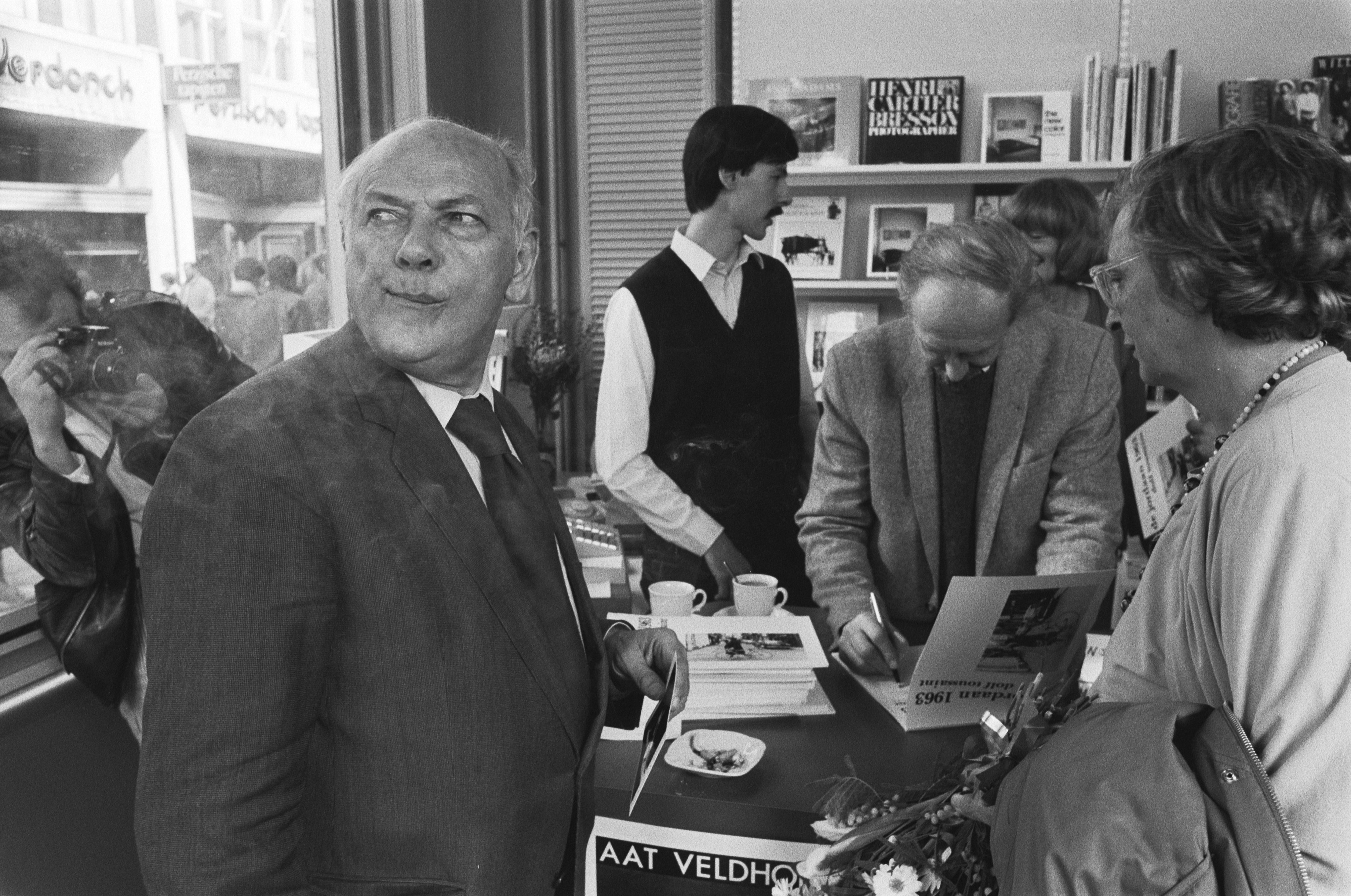 Den Uyl opent fototentoonstelling "Jordaan 1963" van Dolf Toussaint in de Canon Photo Gallery. Den Uyl en echtgenote